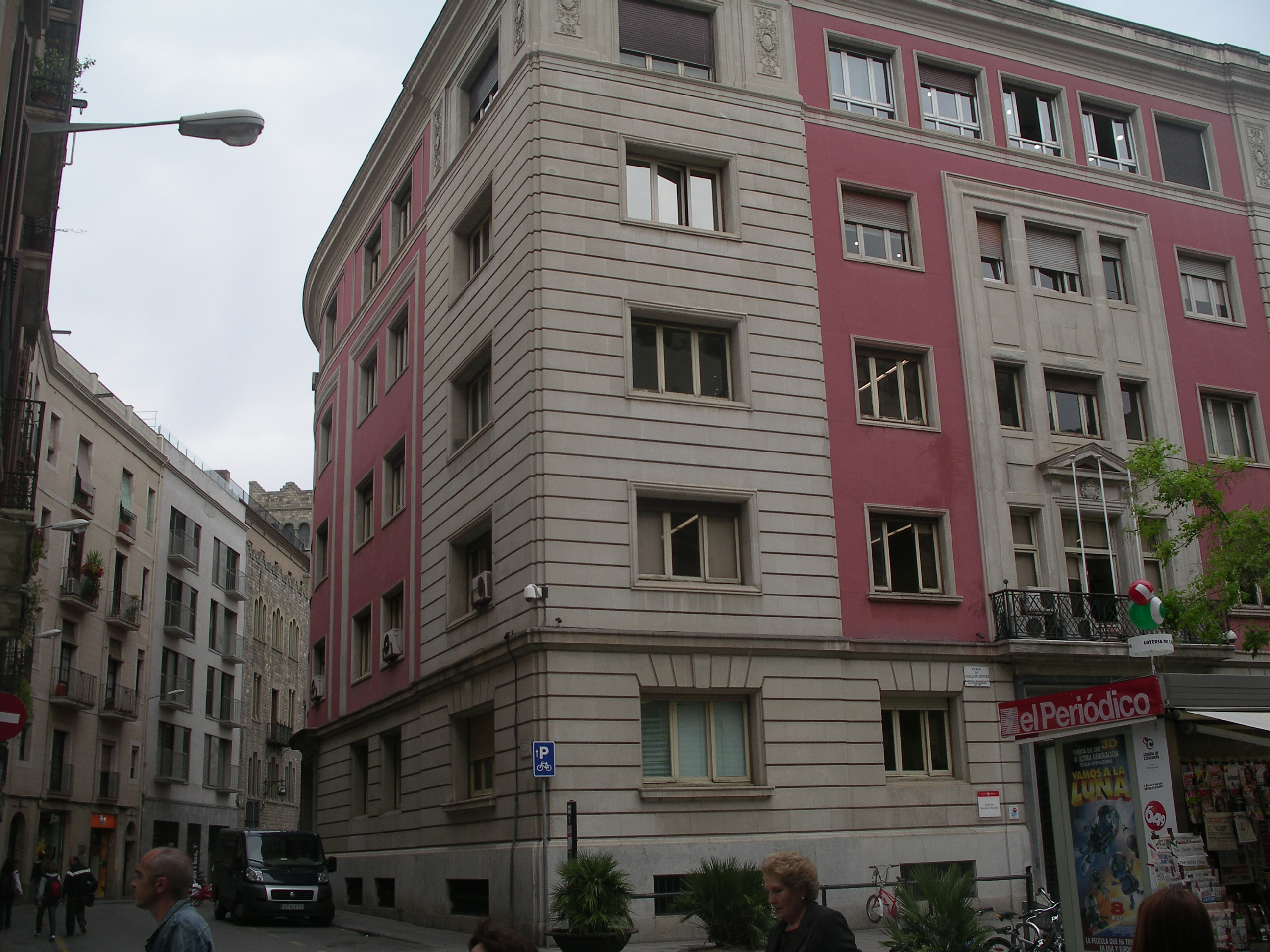 Institut Municipal d'Estadística de Barcelona, al solar que ocupava l'antiga església dels teatins i el Teatre Tirso de Molina, al costat del Portal de l'Àngel